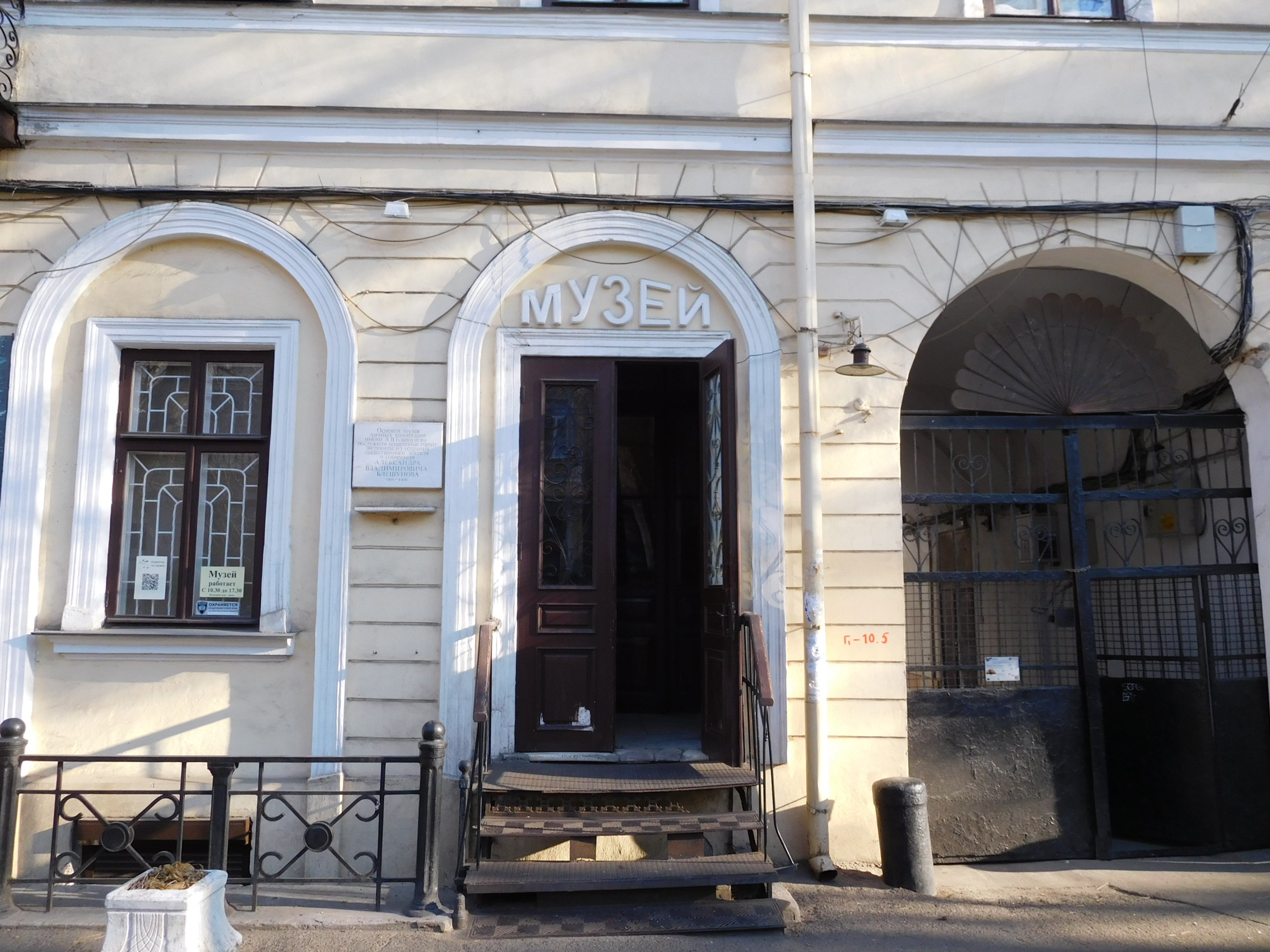 Вхід до музею ім. Блещунова